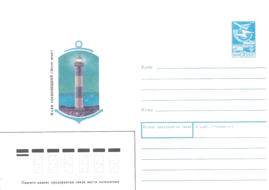 Маяк Сосновецкий (Белое море).